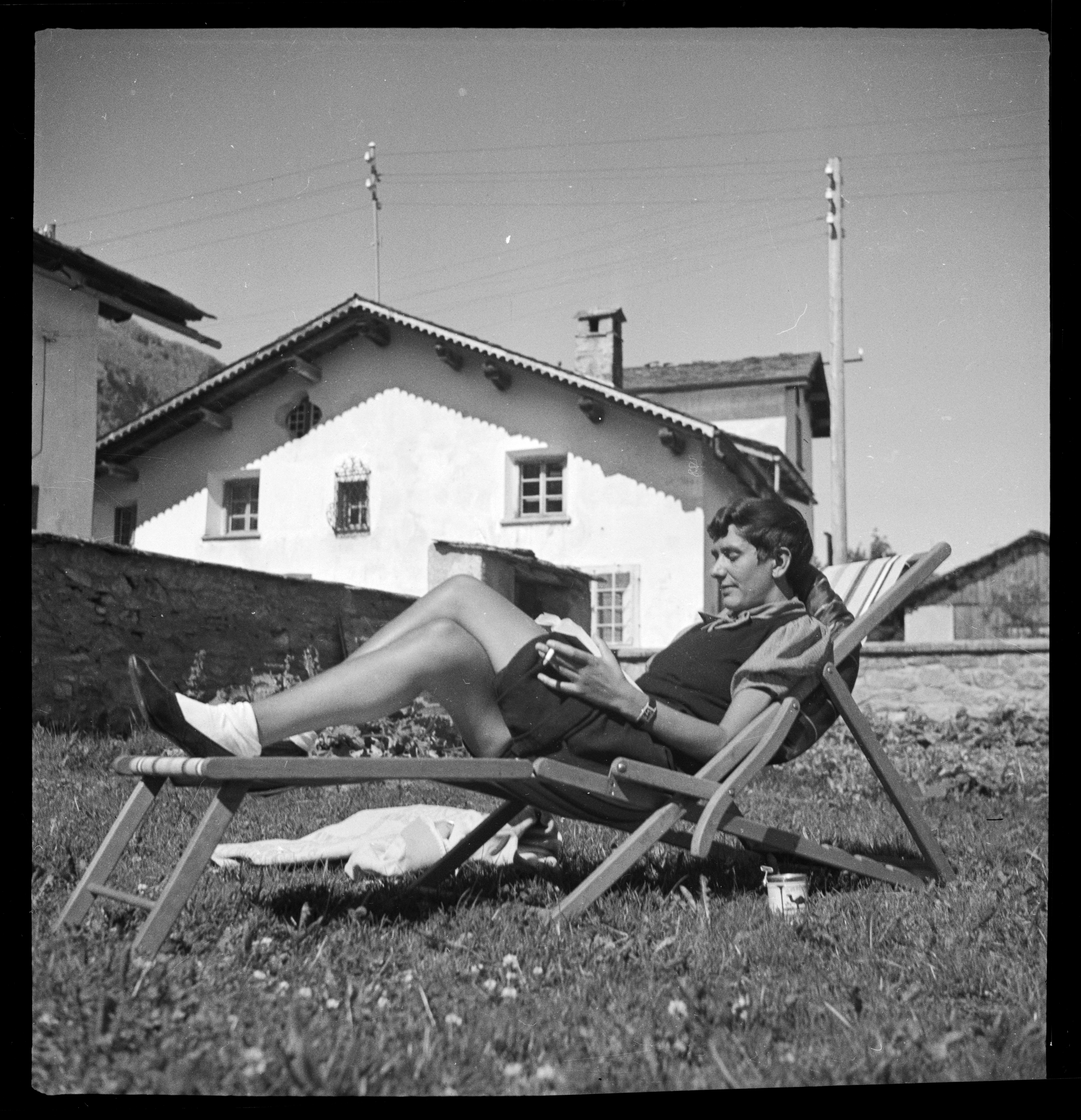 Schweiz, Sils: Menschen; Erika Mann sitzend vor der Chesa Jäger; Segl